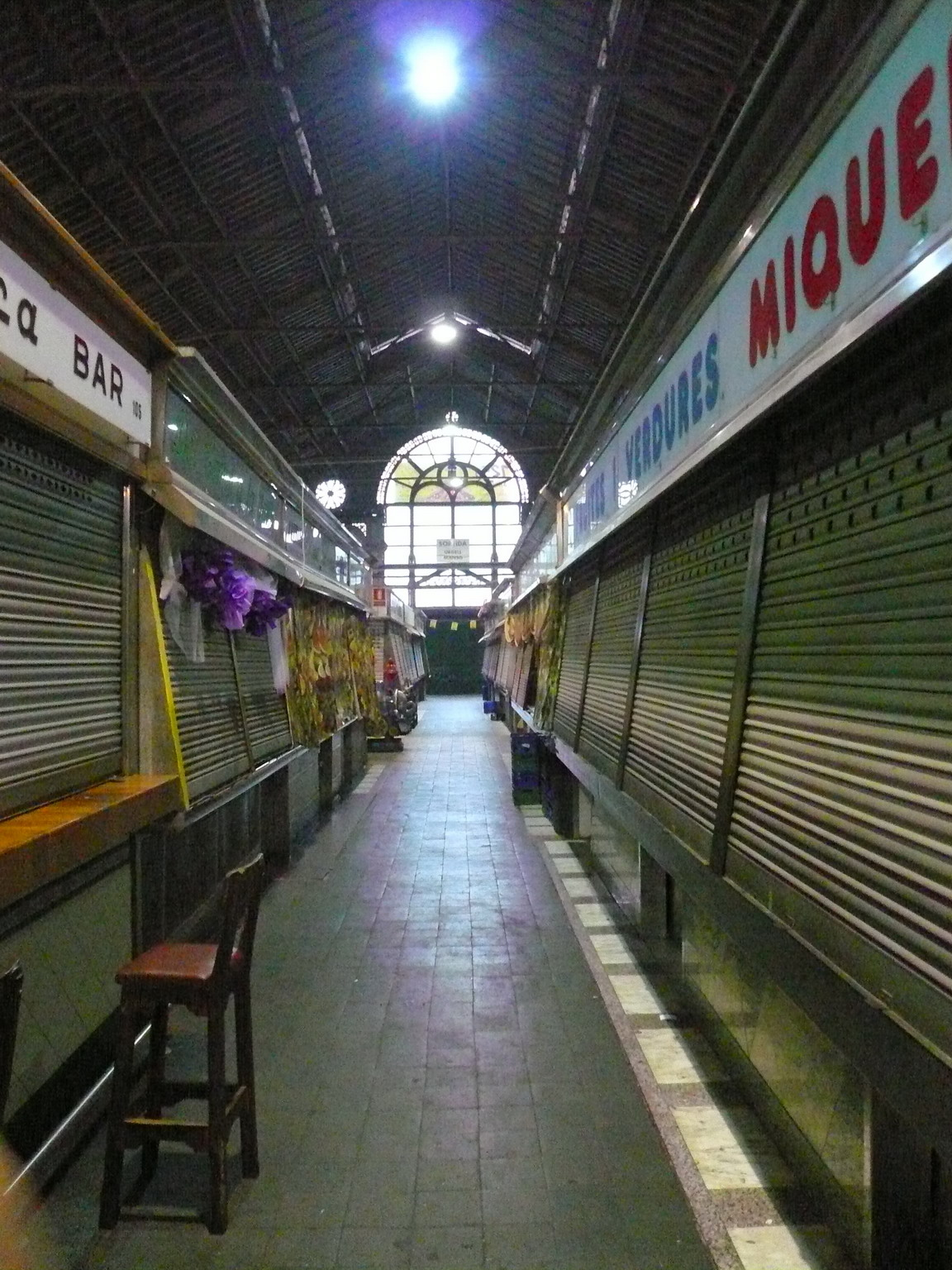 Mercat de Sant Antoni (Barcelona)